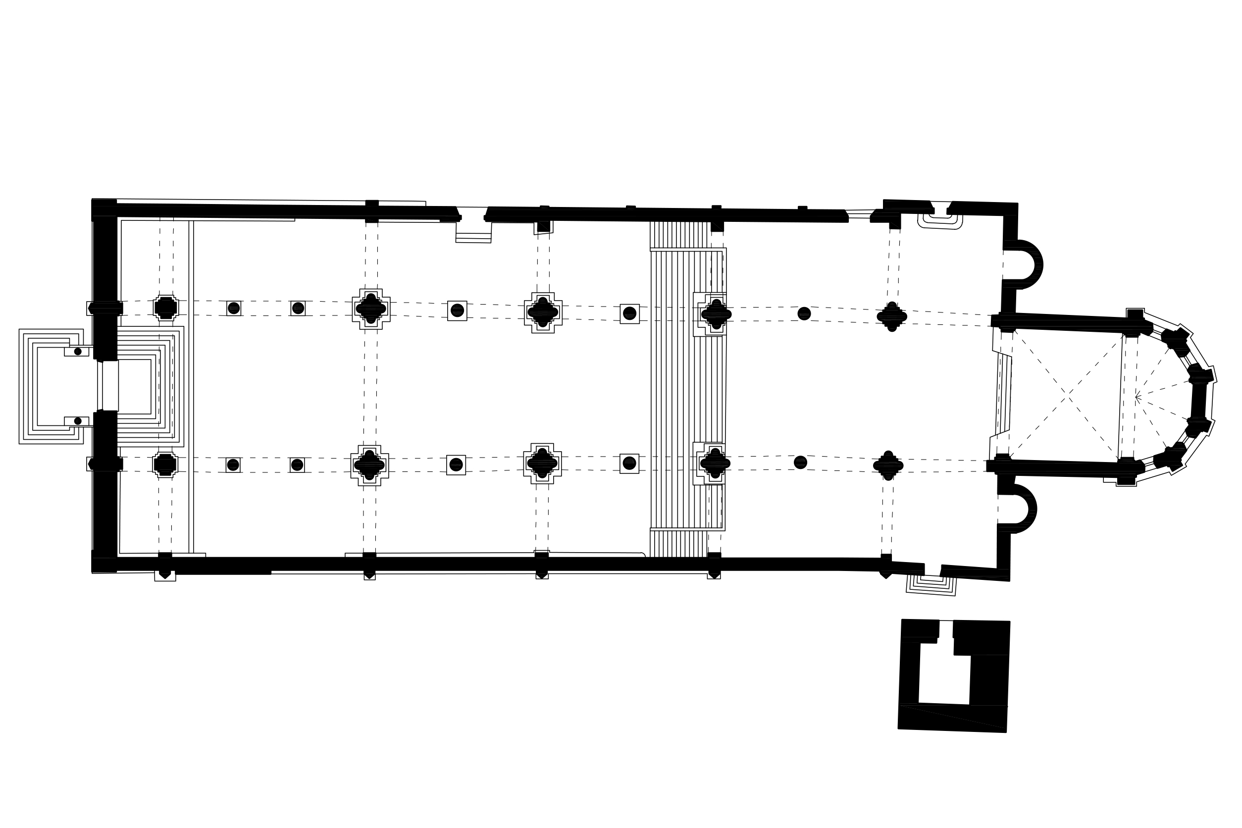 Pianta dell'aula della basilica di San Zeno